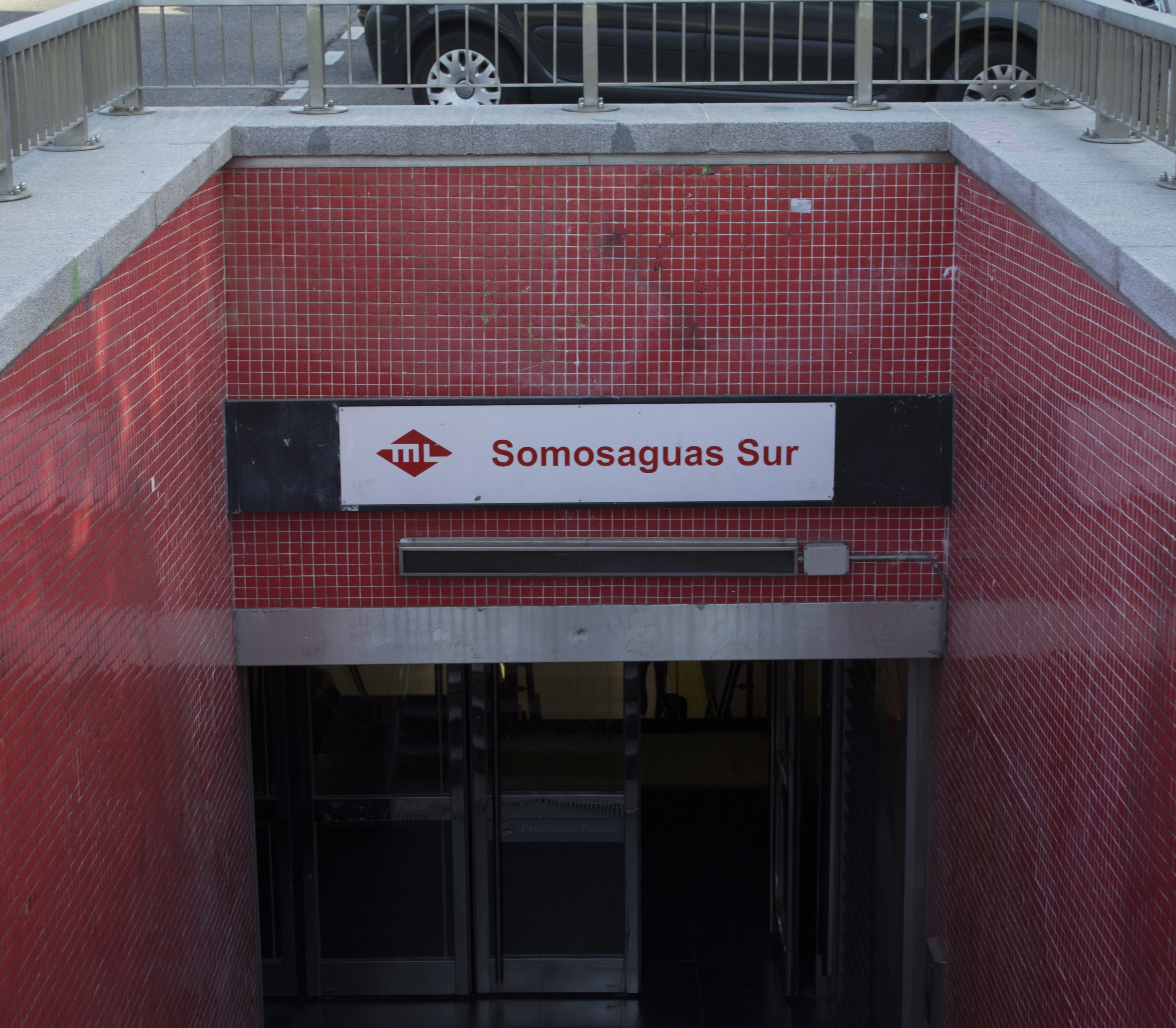 Acceso a la estación Somosaguas Sur, de Metro Ligero Madrid, una de las tres únicas paradas de ML2 con entrada de viajeros por subterráneo.